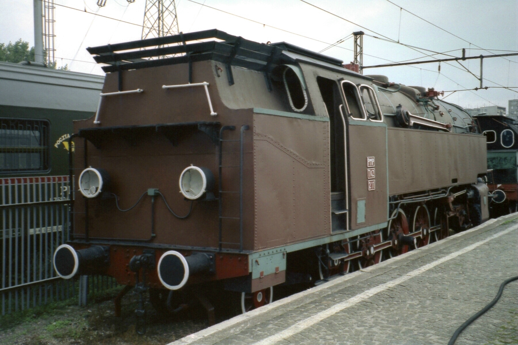 Dampflokomotive TKz-211 der PMP Warszawa 06.09.94